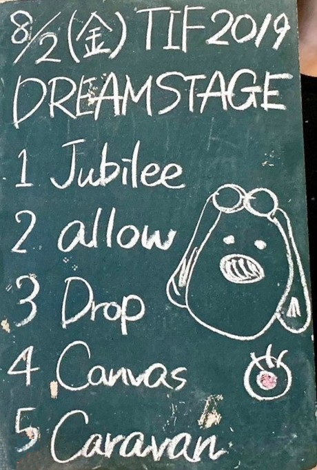 amiinAセトリボード